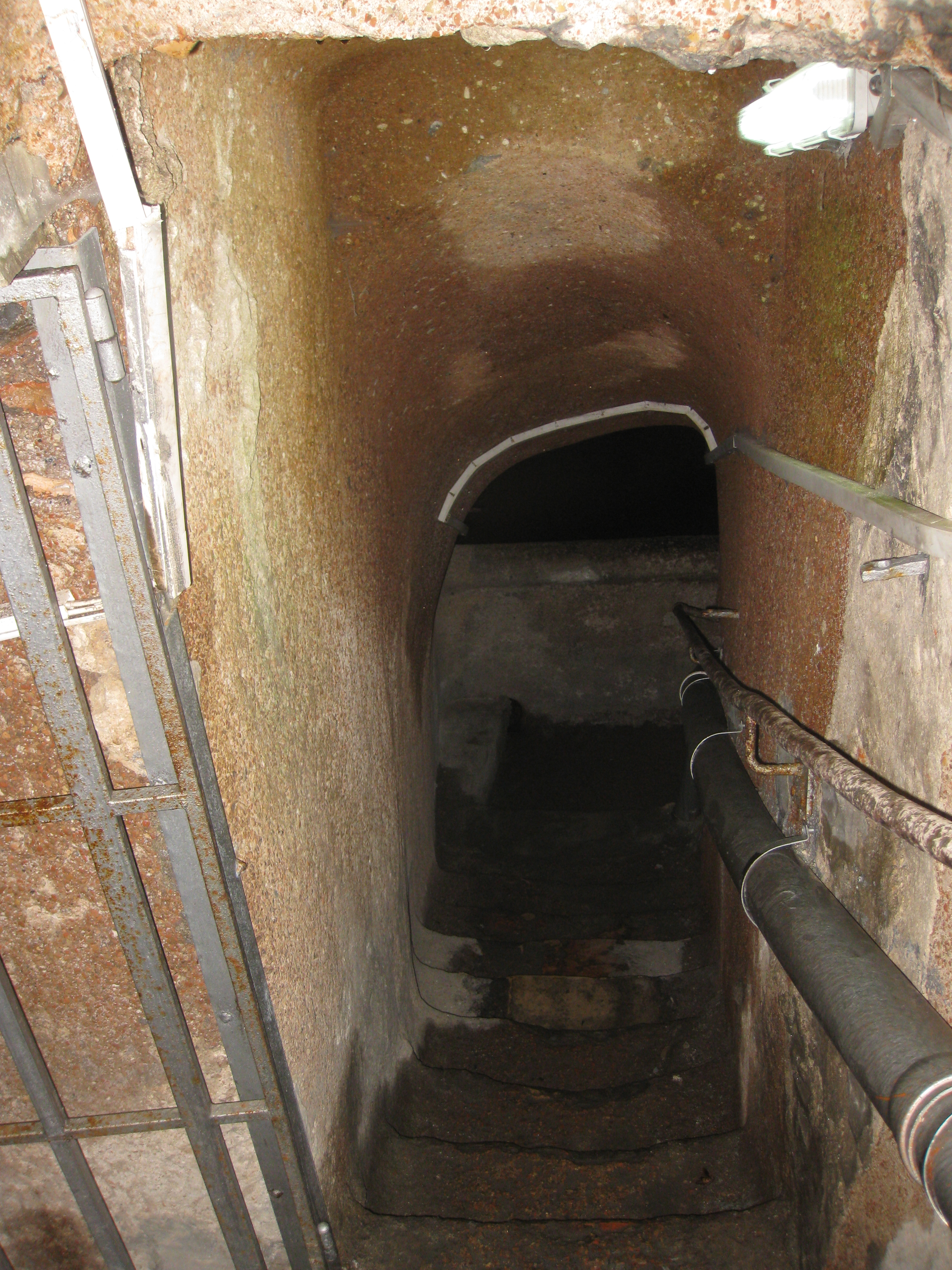 The Christian Quarter - Queen Helen Coptic Orthodox Church Cistern הרובע הנוצרי בעיר העתיקה של ירושלים בור המים שתחת הכנסייה הקופטית